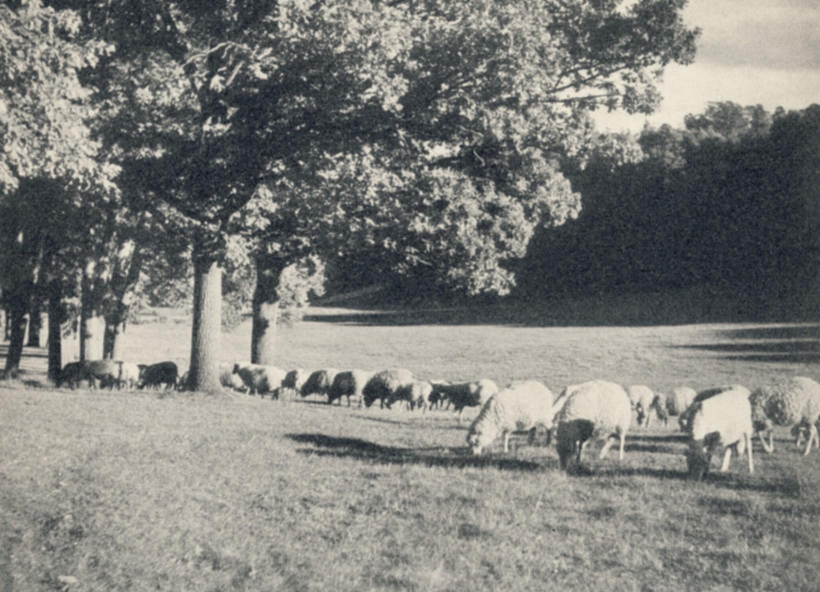 Betande får i Hagaparken